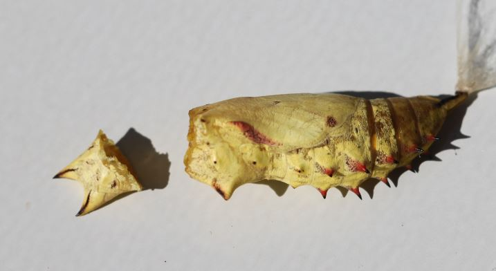 Puppe eines Tagpfauenauges (Aglais io) nach dem Schlüpfen eines Parasiten, einer Schlupfwespe, vermutlich Hoplismenus terrificus